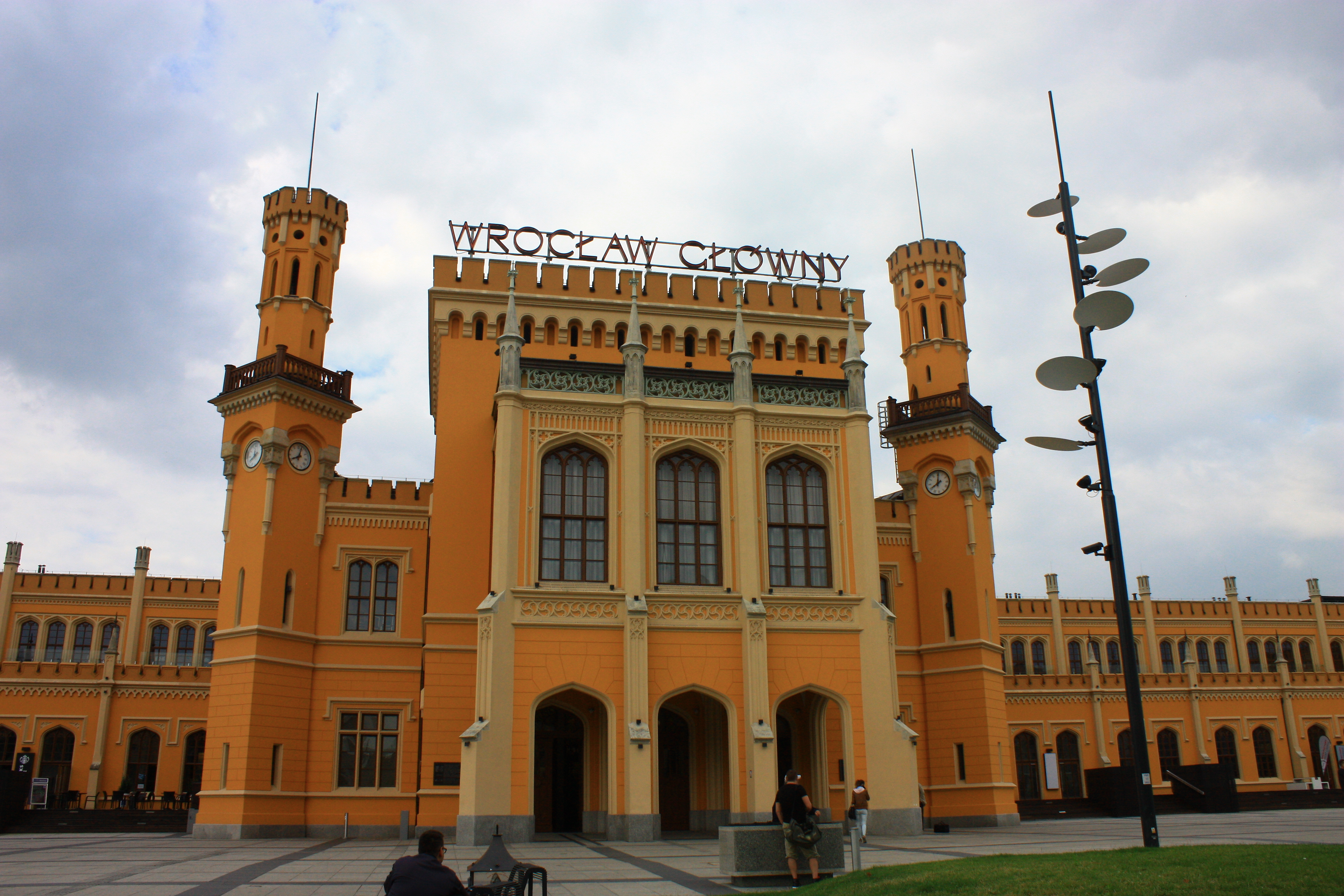 Wrocław, Dworzec Główny, 1856, 1899-1904